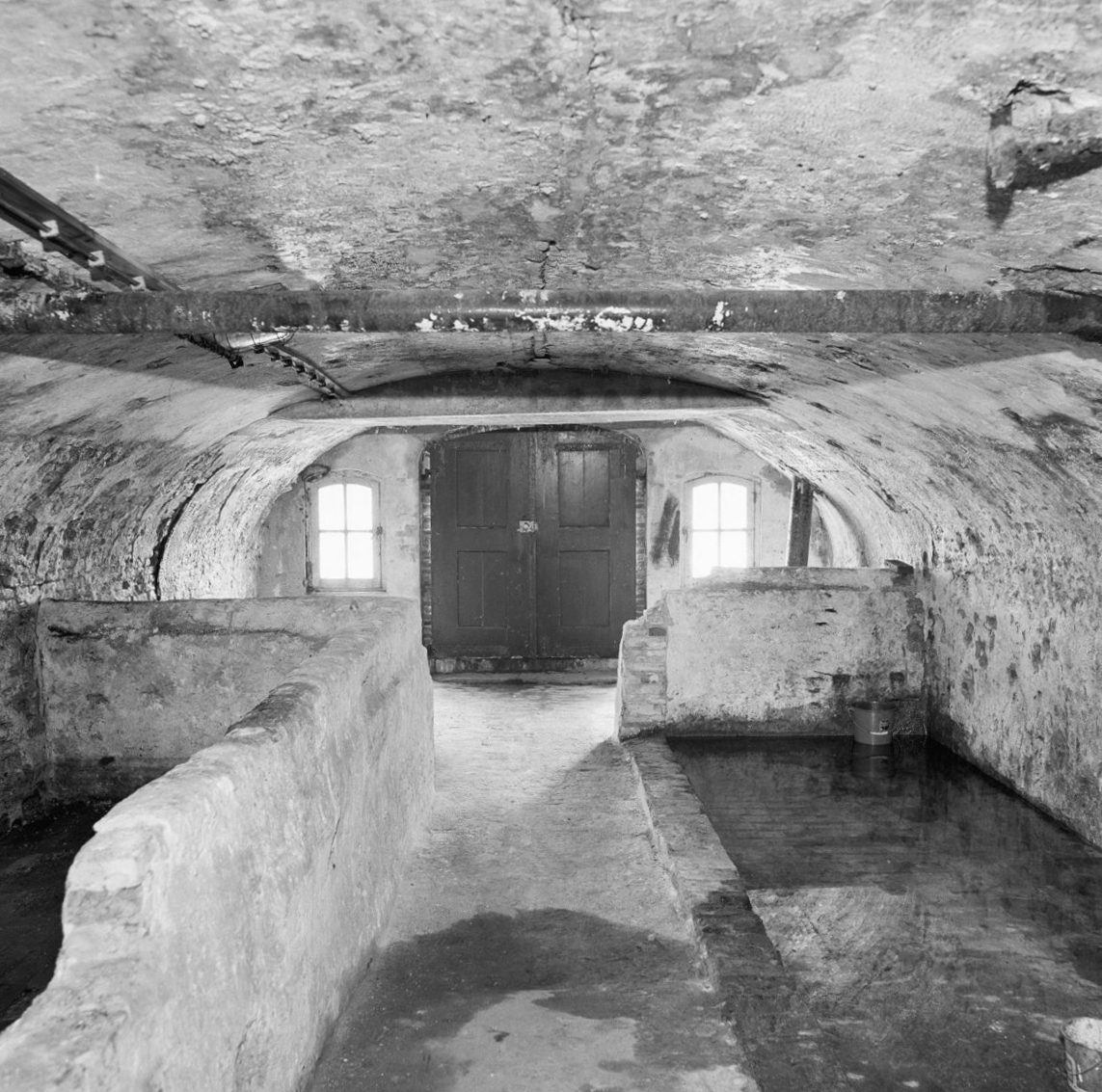 interieur, kelder (werfkelder)